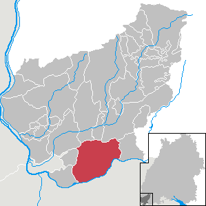 Rheinfelden (Baden), Landkreis Lörrach, Baden-Württemberg